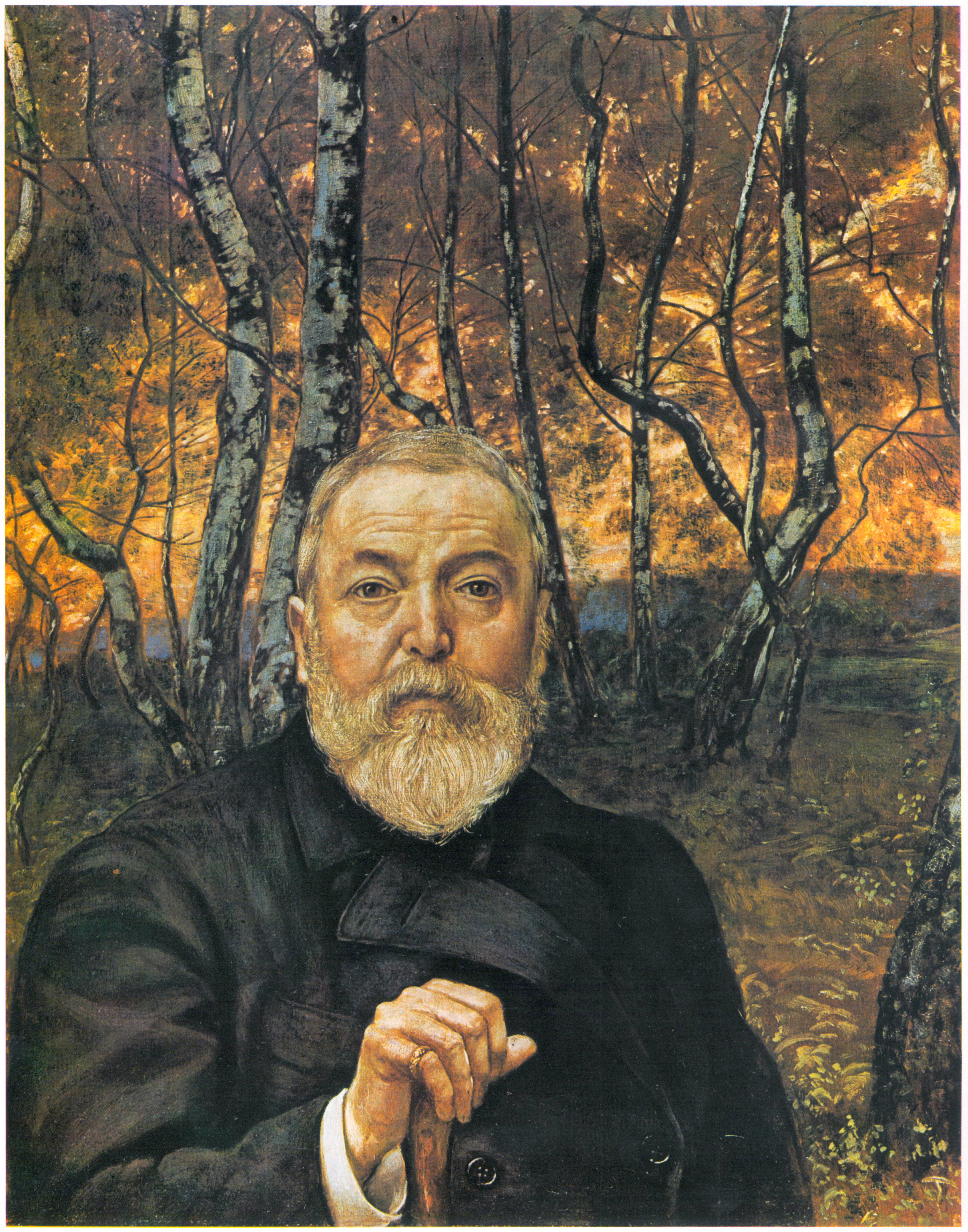 Self-portrait